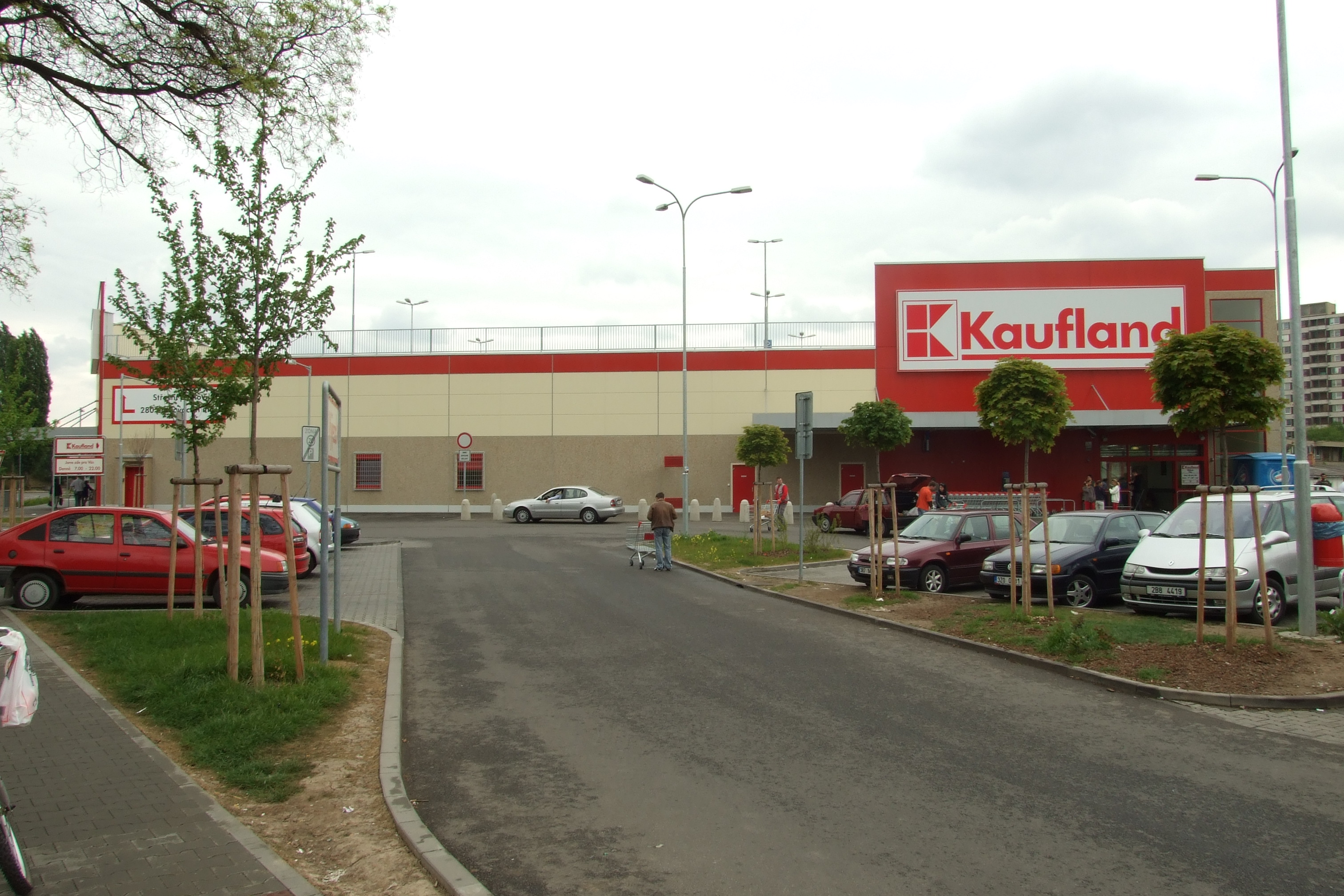 Obchodní dům Kaufland v Brně-Židenicích